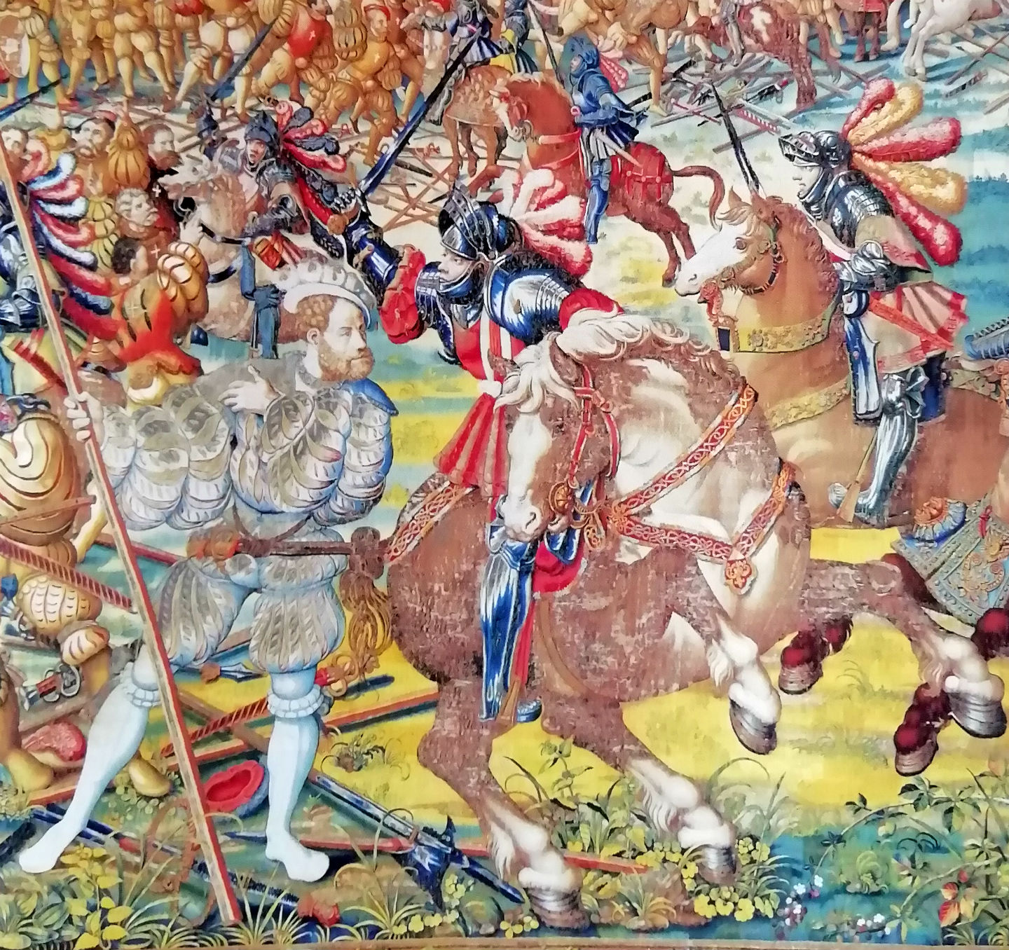 Arazzi Battaglia di Pavia - Jean de Diesbach (mercenario svizzero)